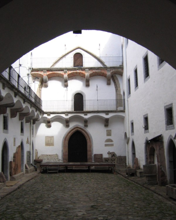 Vnútorné nádvorie Starého zámku, Banská Štiavnica